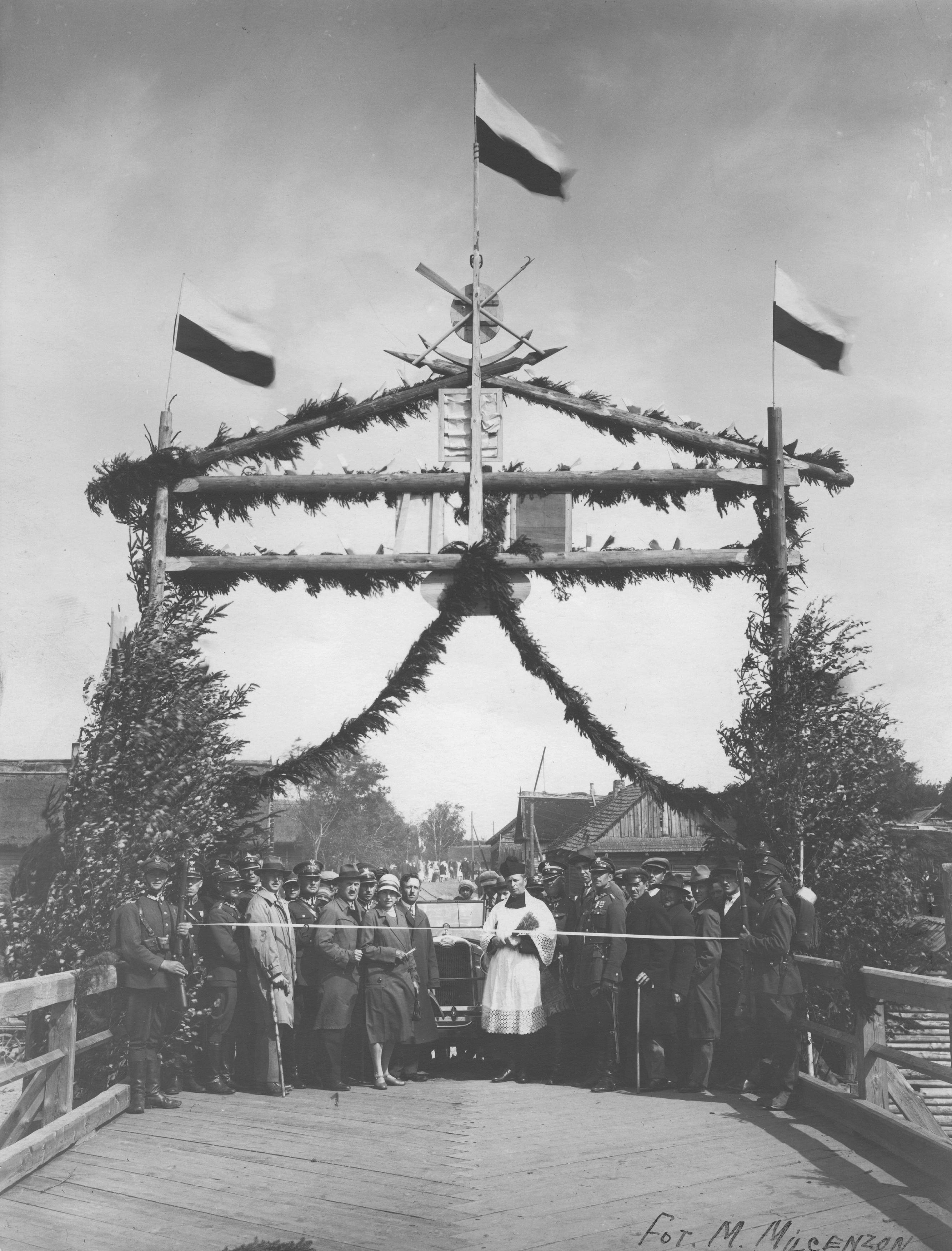 Беларуская (тарашкевіца): Мікалаеўшчына (Mikałajeŭščyna), адкрыцьцё моста церазь Нёман (Nioman)